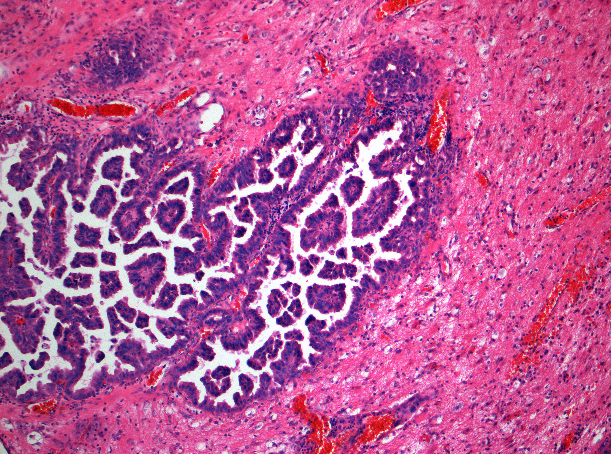 Histologie einer Hirnmetastase eines Karzinoms. Tumorzellverbände infiltrieren zapfenförmig reaktiv verändertes Hirngewebe. Hämatoxylin-Eosin-Färbung.